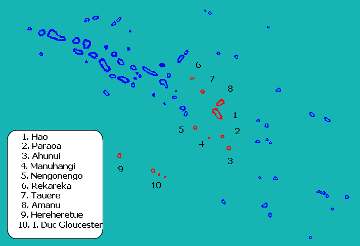 Mapa de localització de la comuna Hao a l'arxipèlag Tuamotu, Polinèsia Francesa.